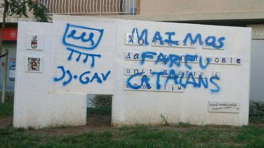 Pintada del GAV al Monument a Estellés de les Trobades d'Escoles en Valencià, d'Alboraia, inaugurat en 2013.